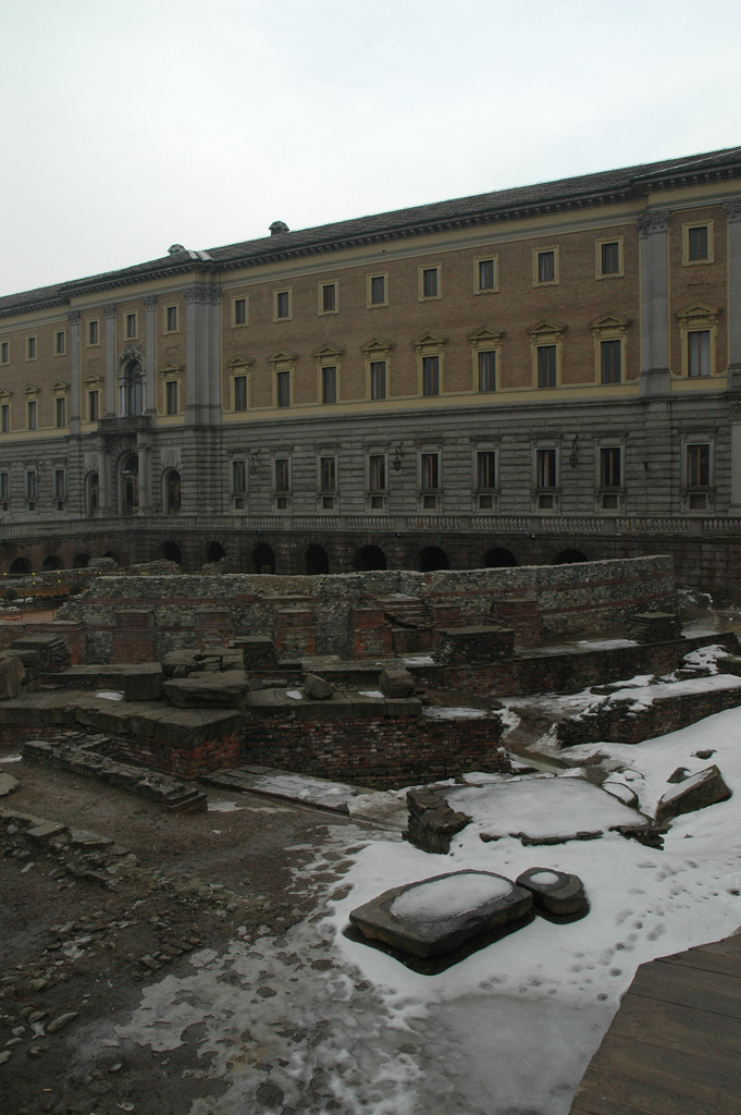 Il teatro romano accanto al Palazzo Reale a Torino, Italia.